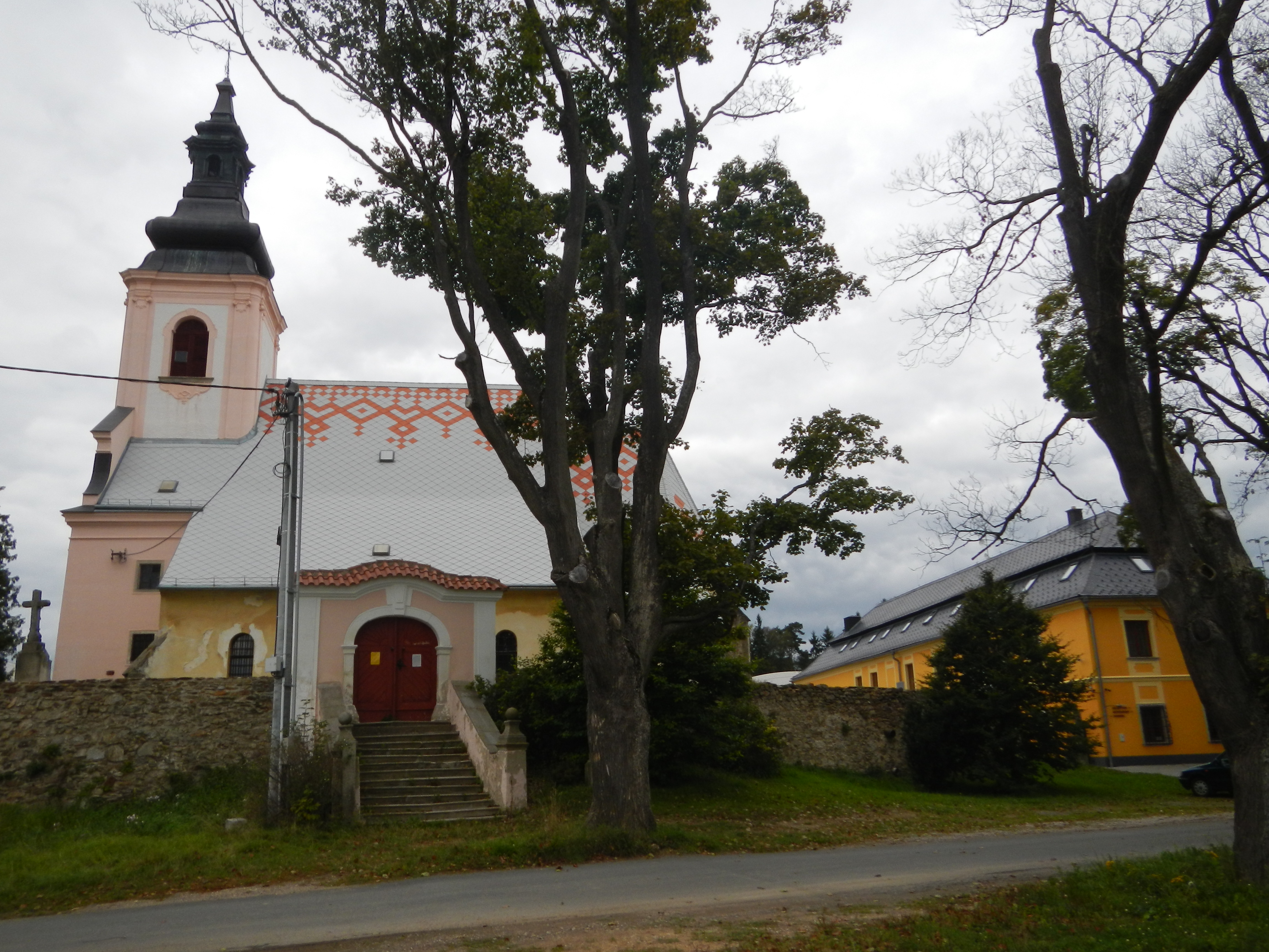 Kostel sv. Petra a Pavla (Rančířov), SV část obce, Rančířov